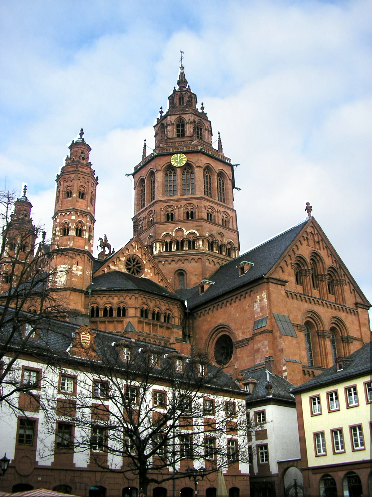 Bildmotiv: Der Mainzer Dom von Südwesten